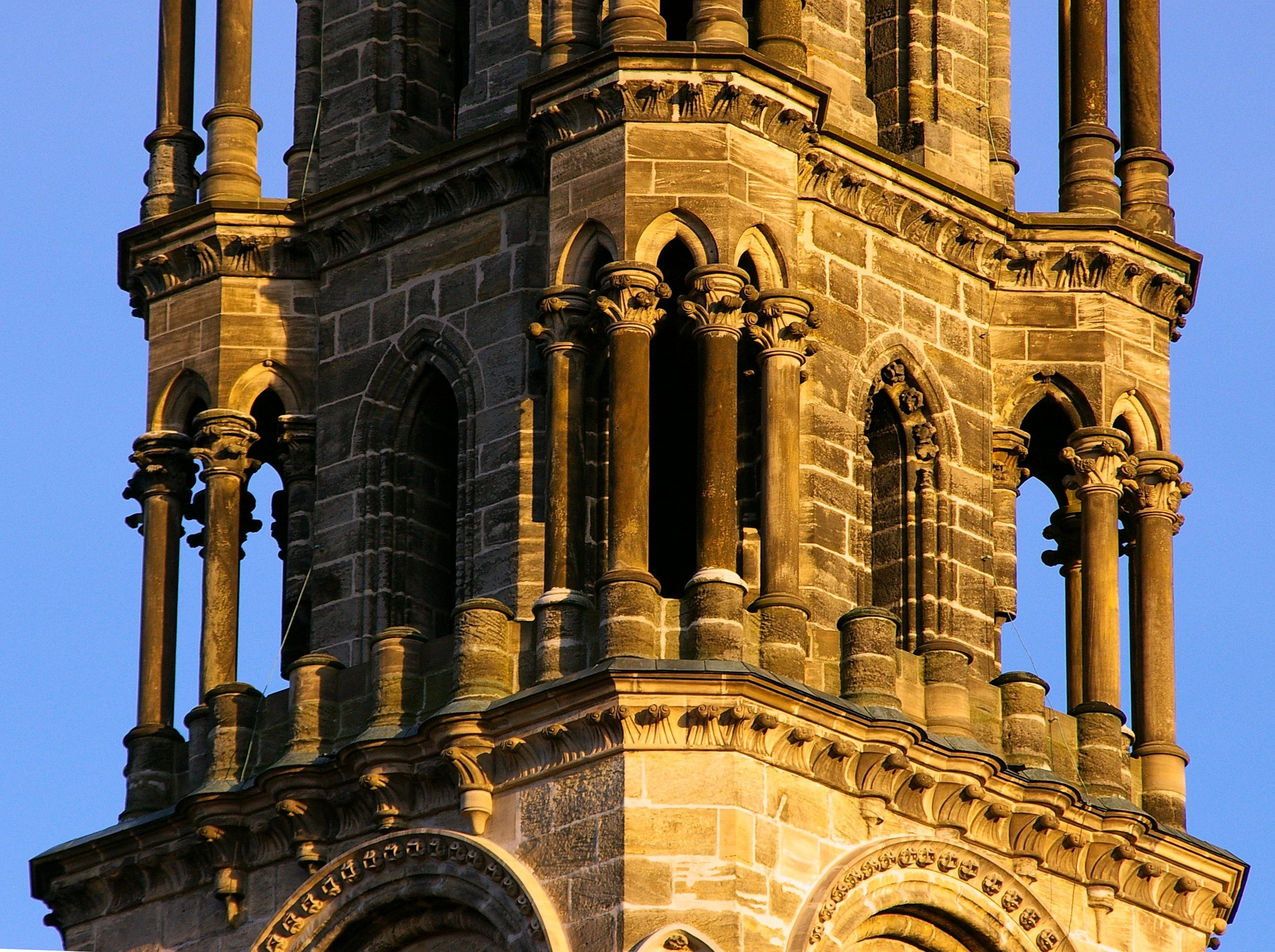 Bamberg - Dom - Detail eines der gotischen Westtürme